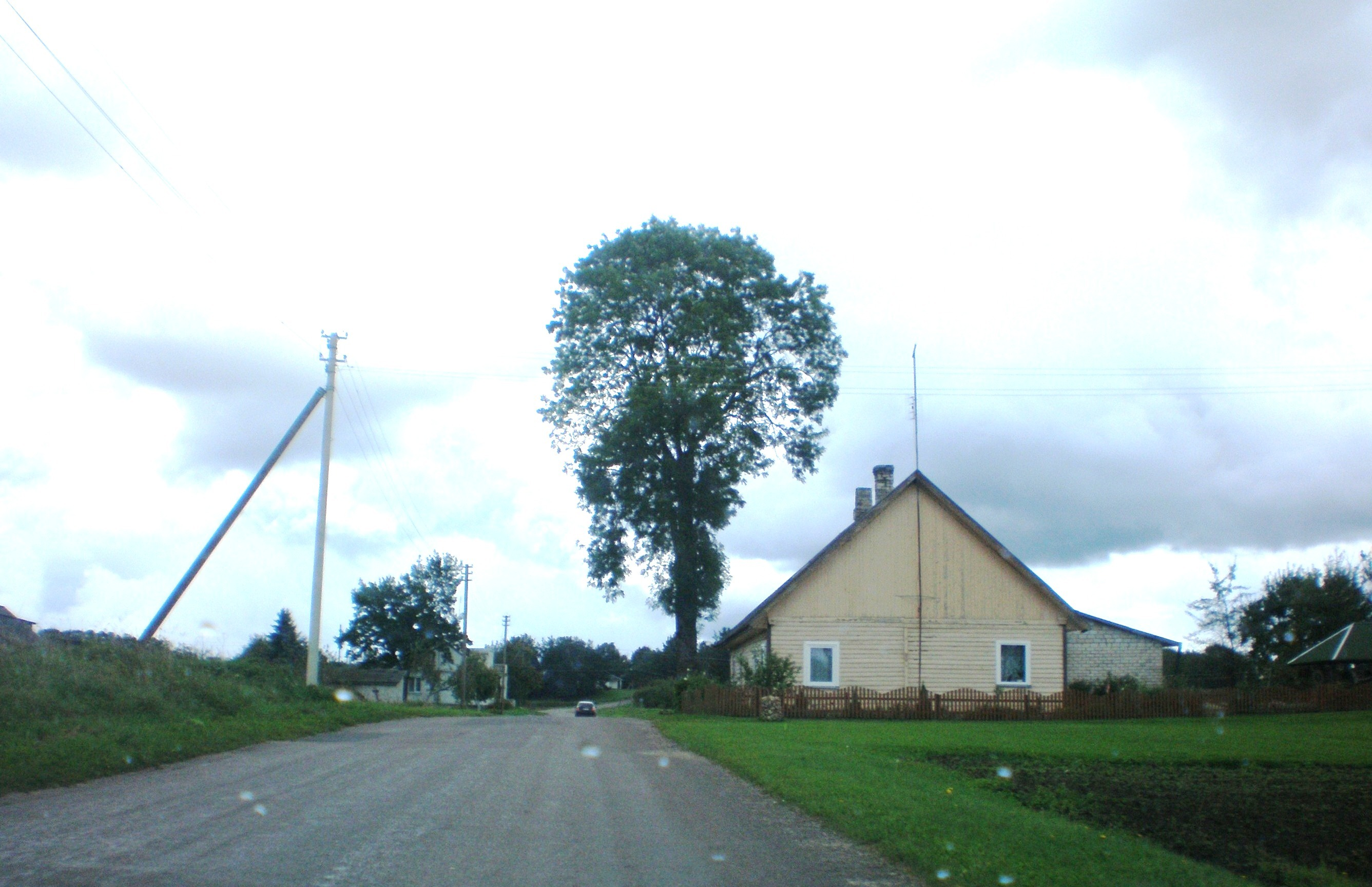 Vilkiautinis, Varėnos raj.